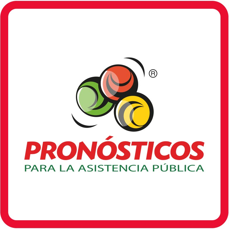 Logotipo de Pronósticos para la Asistencia Pública